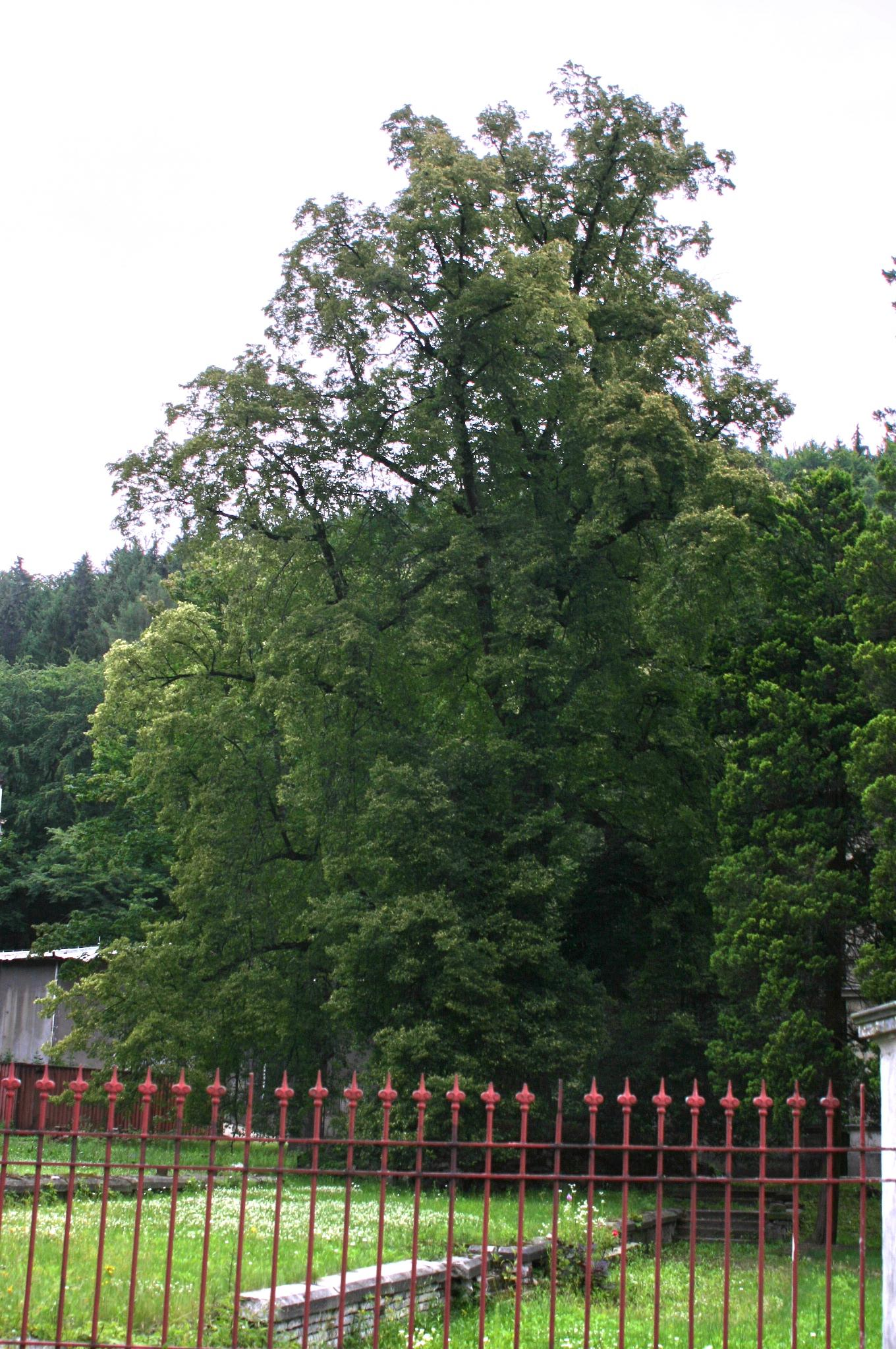 Chráněný jírovec v Šumné u Litvínova